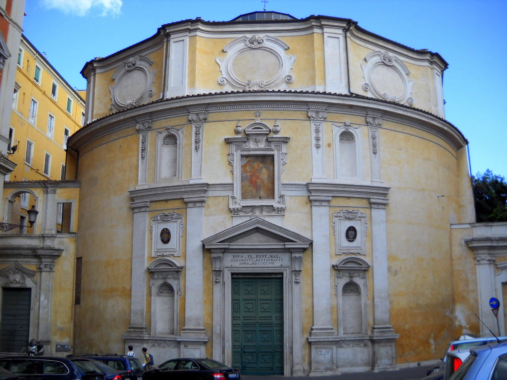 Chiesa_di_San_Bernardo_alle_Terme